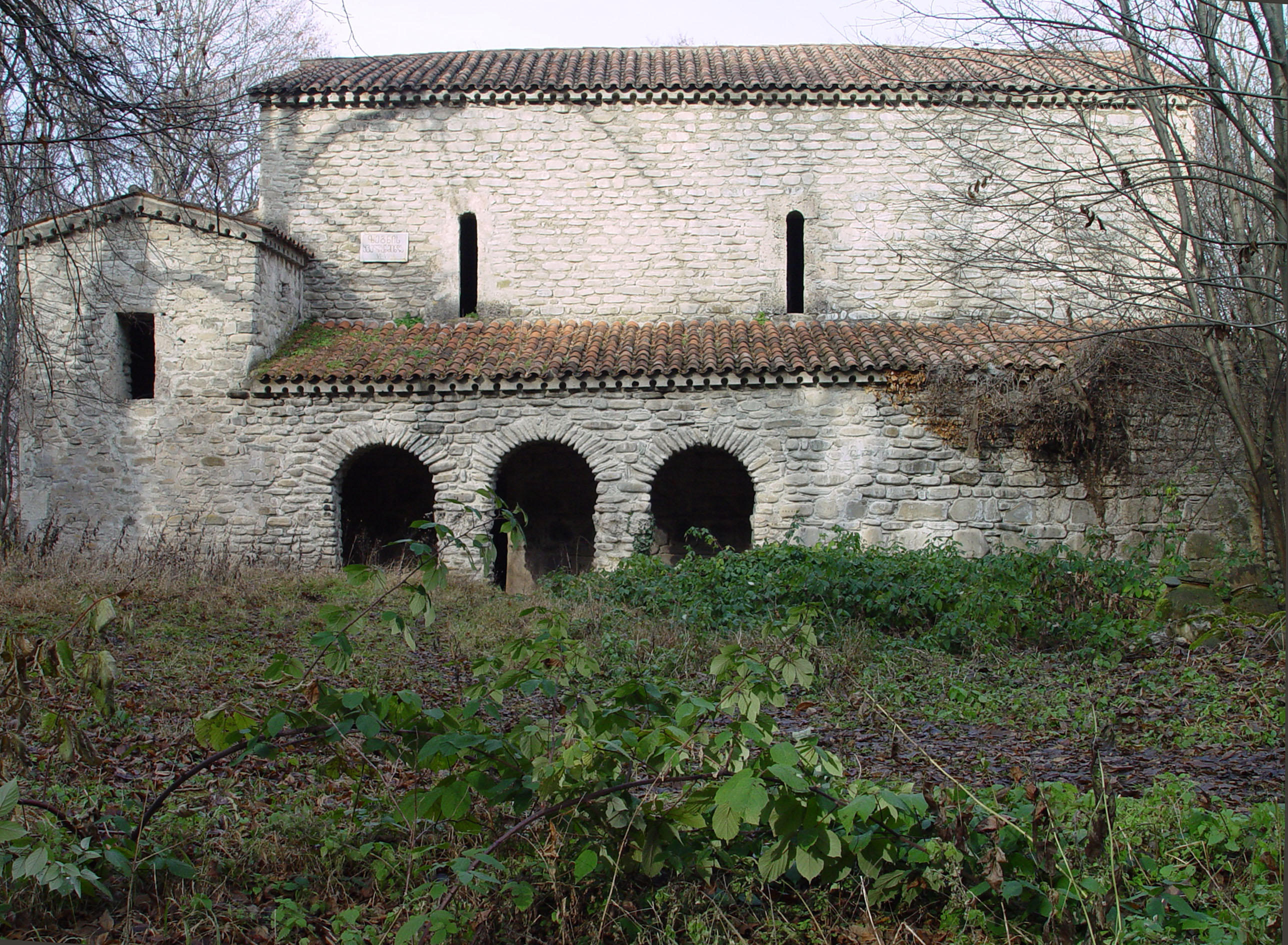 фото монастырья им. Богородицы